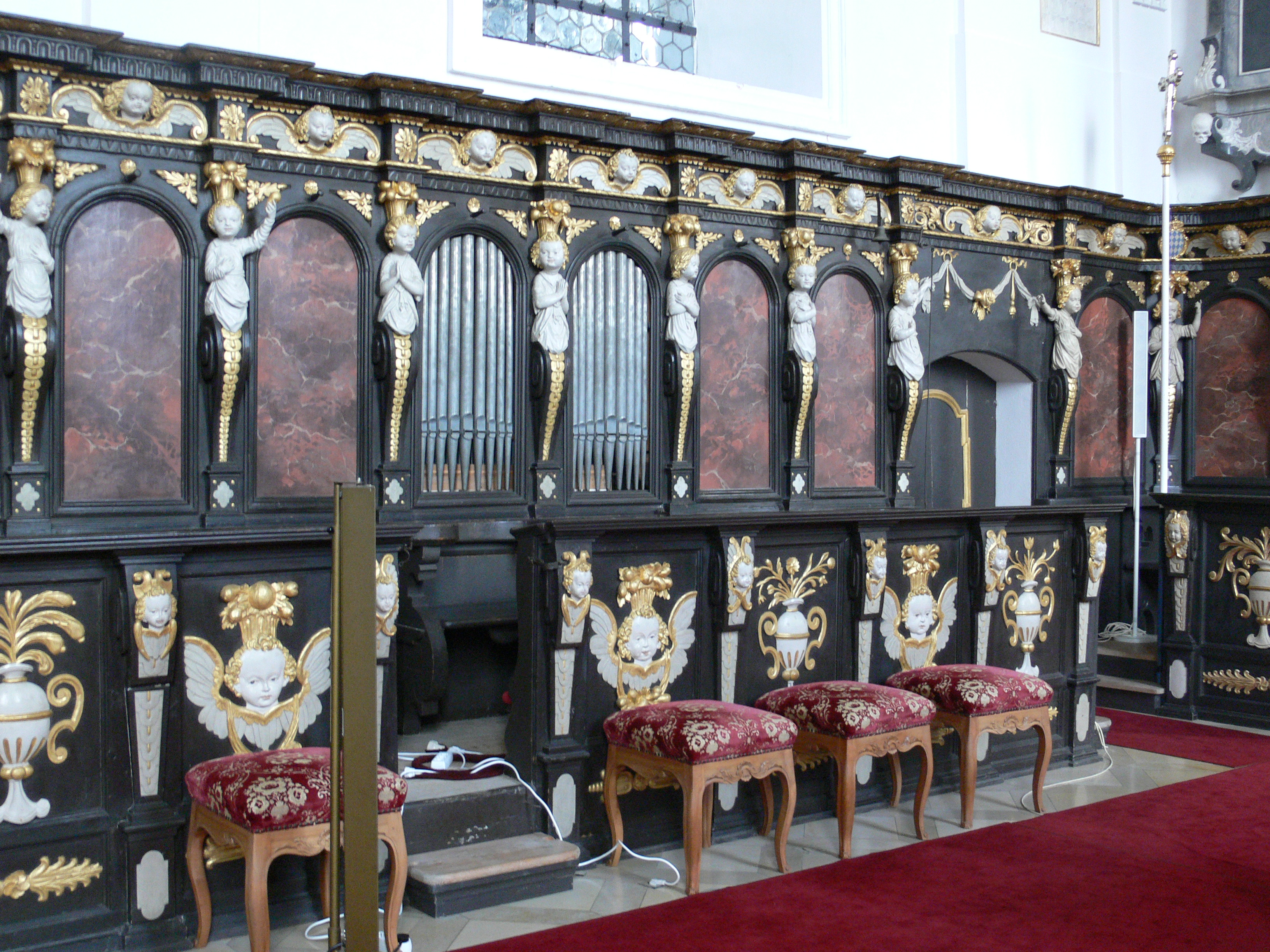 Pfarrkirche (ehem. Stiftskirche) St. Maria, Schloss Zeil, Leutkirch im Allgäu Chororgel (von Daniel Hayl, um 1609) im Renaissance-Chorgestühl von Jakob Bendel